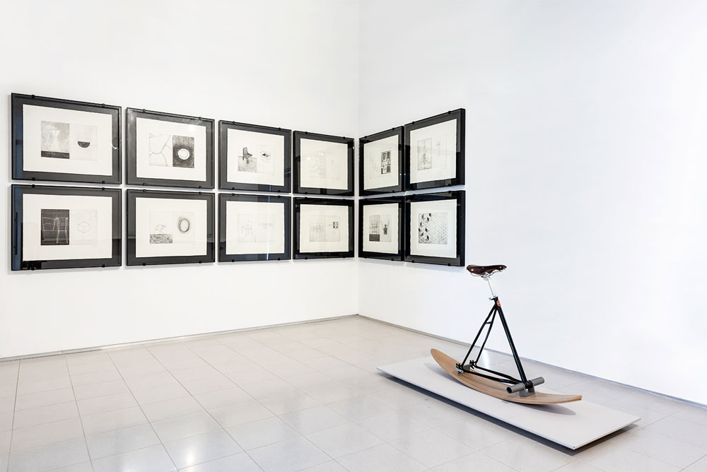 תמונה מתוך התערוכה